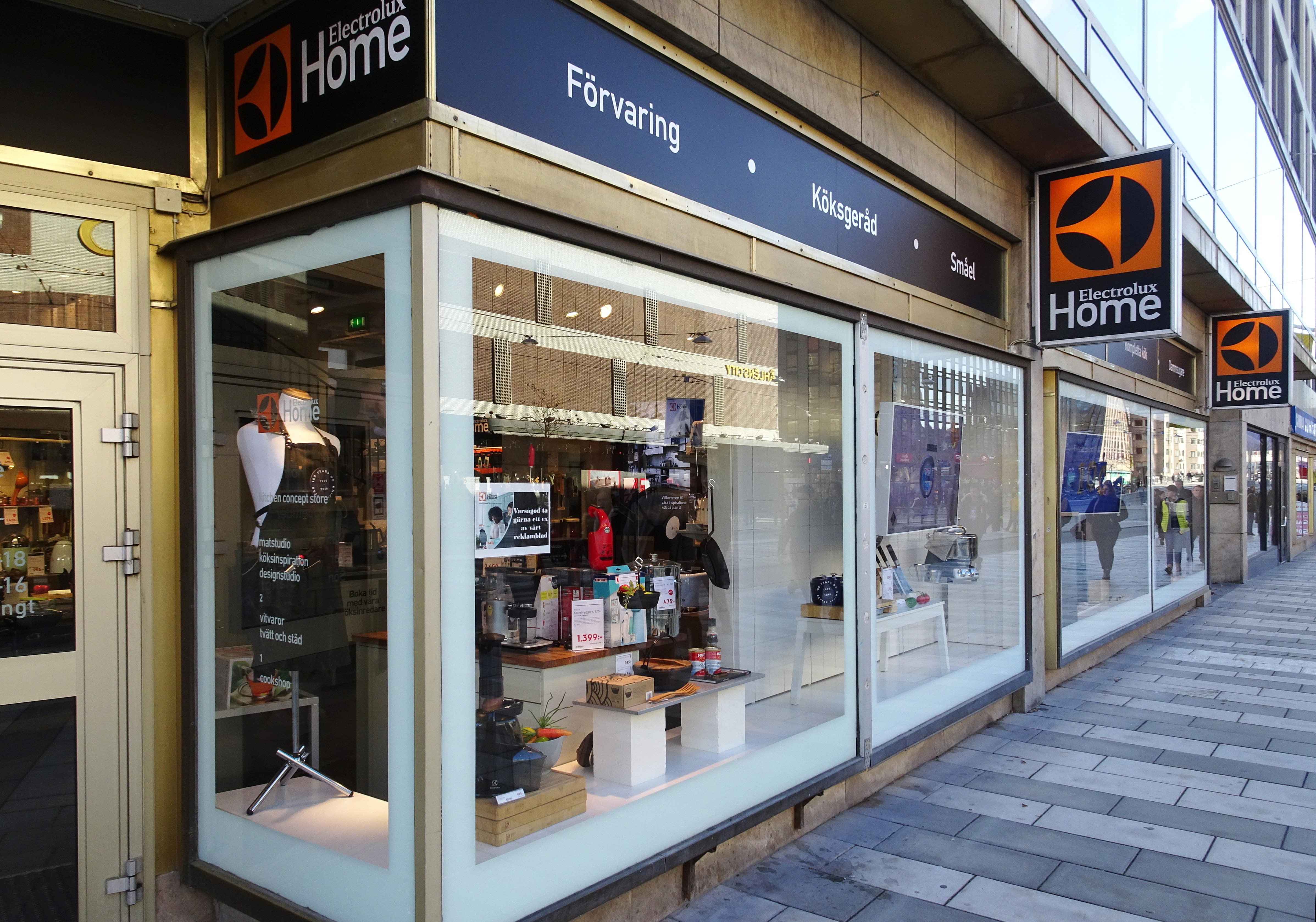 Klarabergsgatan 33-35, Orgelpipan 4, arkitekt Lennart Tham